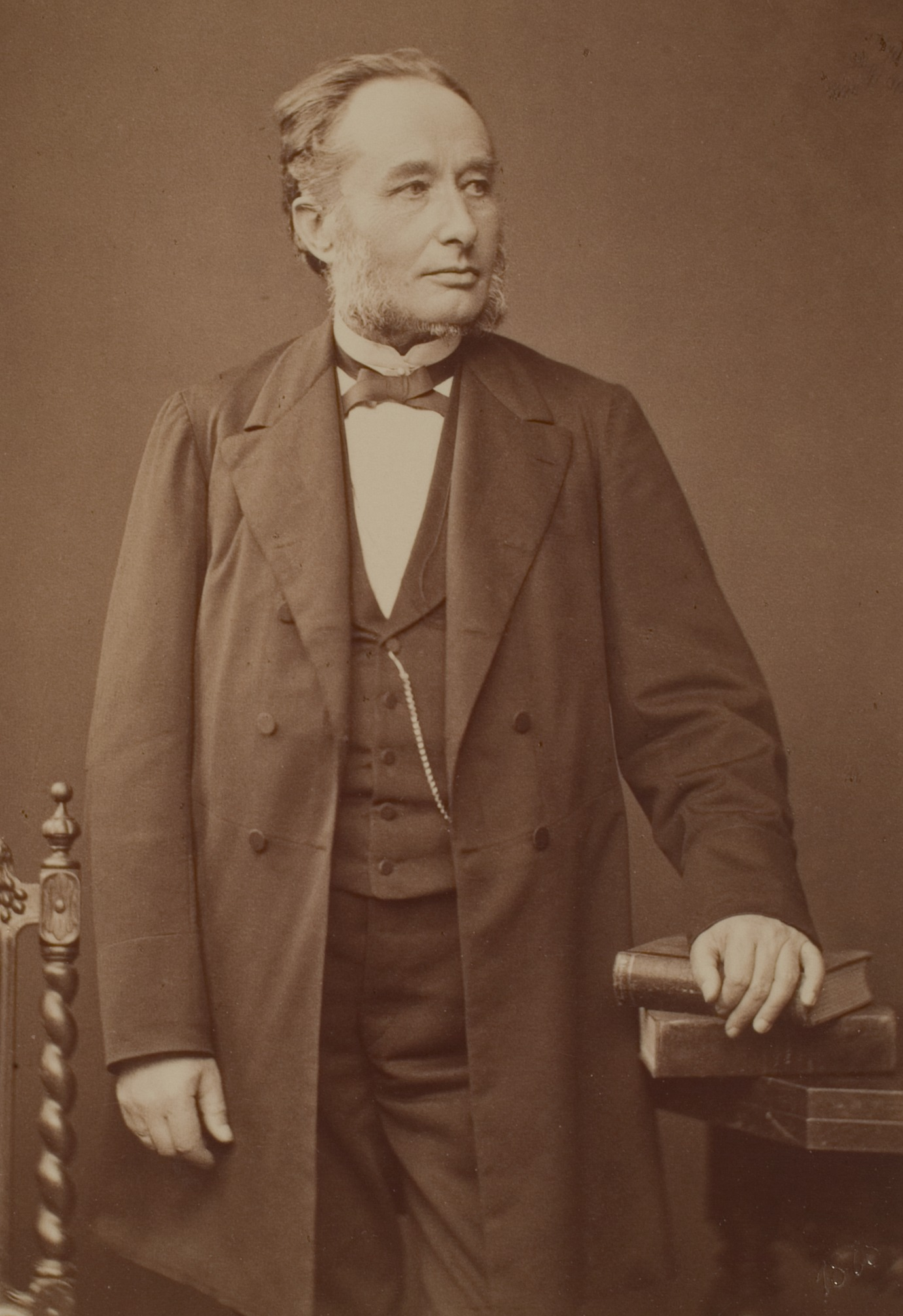 Emil Herrmann, Kirchenrechtler und Jurist, 1868–1873 Professor in Heidelberg